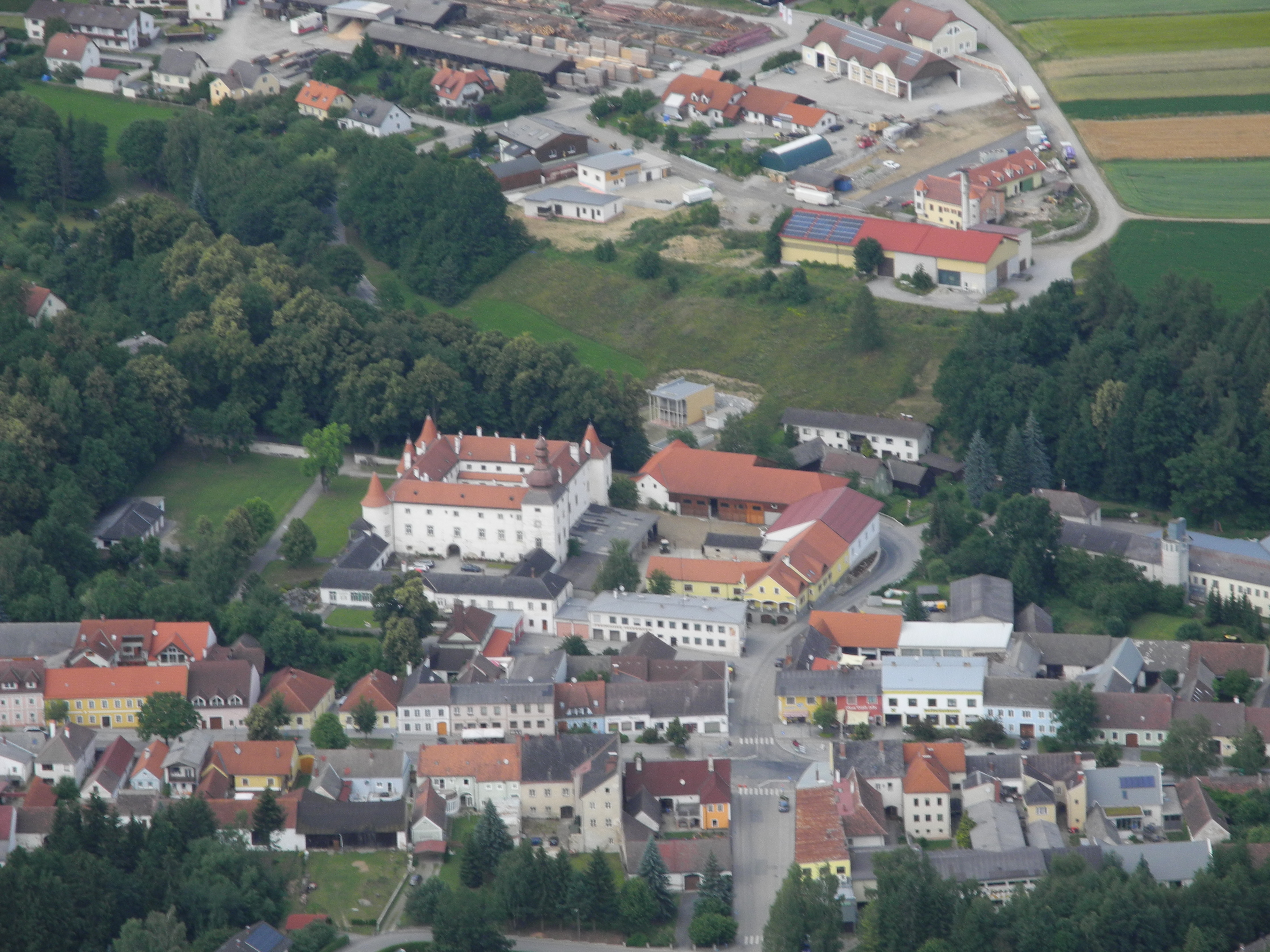 Dobersberg